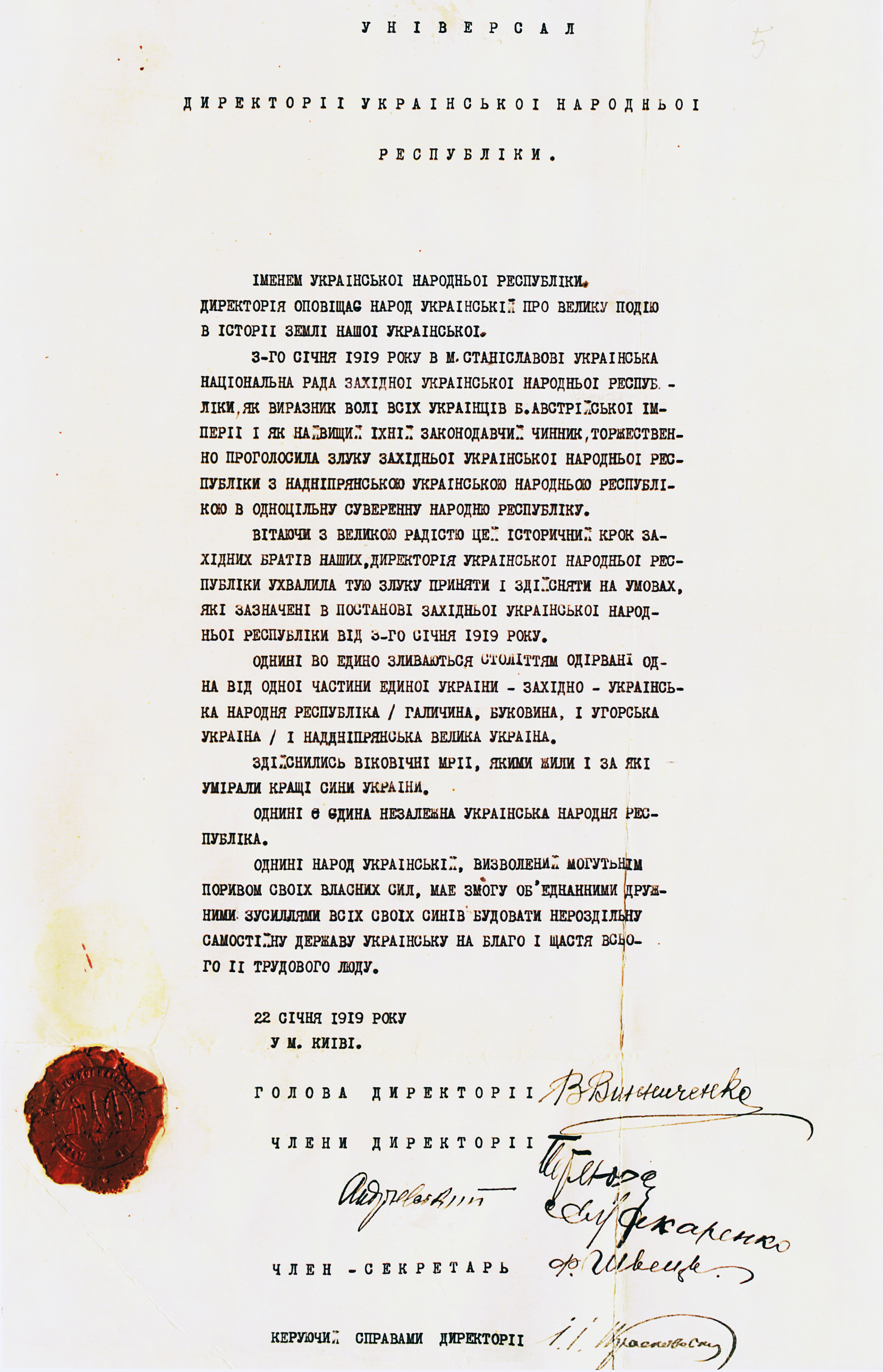 Dekret z 22 stycznia 1919 (Dokument Aktu Zjednoczenia)